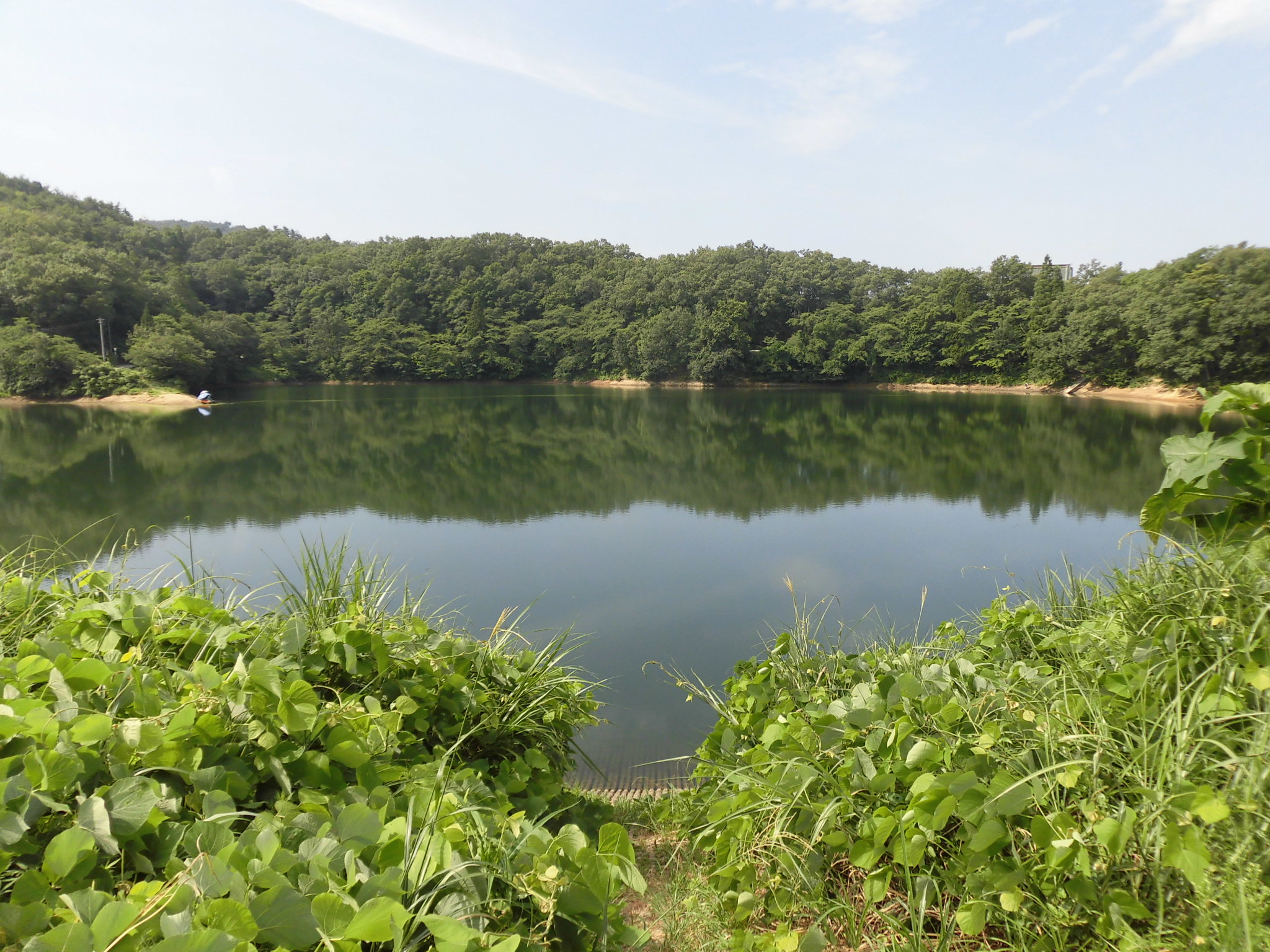 沼の辺貯水池（沼の辺溜池）。山形県山形市沼の辺、鈴川公園内に所在。 昭和17年着工、昭和23年竣工。